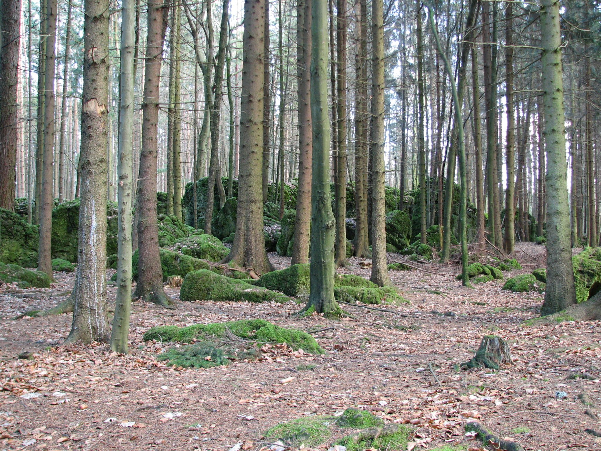 Geotop Druidenhain bei Wohlmannsgesees